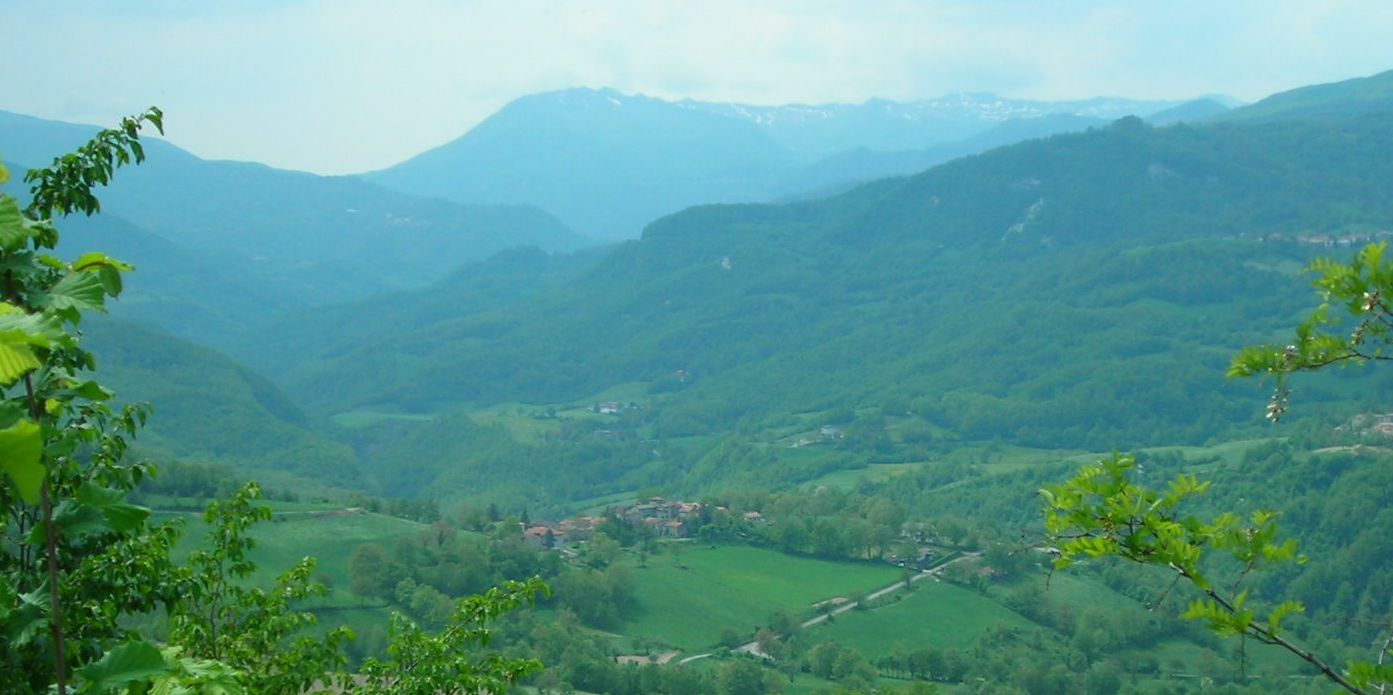 Panorama eseguito dall'Utente:Kronos dell'alta vald'enza e del tratto di appennino da cui origina. Fonte:Macchina fotografica digitale non professionale.